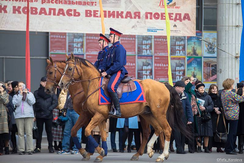 Выступление донских лошадей